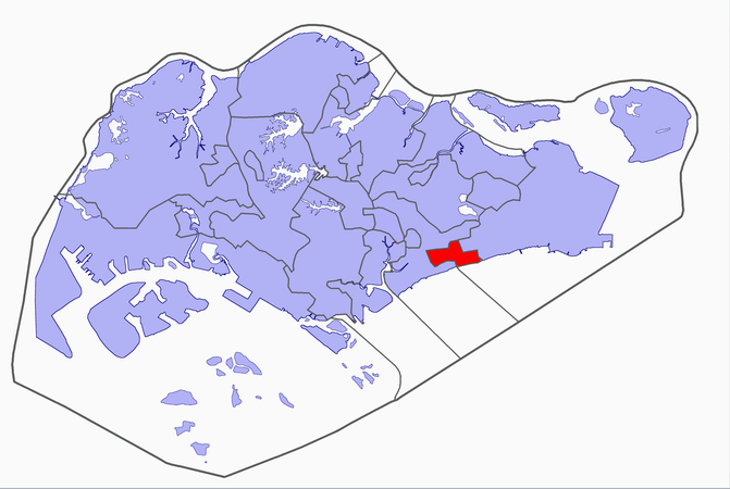 Singapore electoral map, 2006